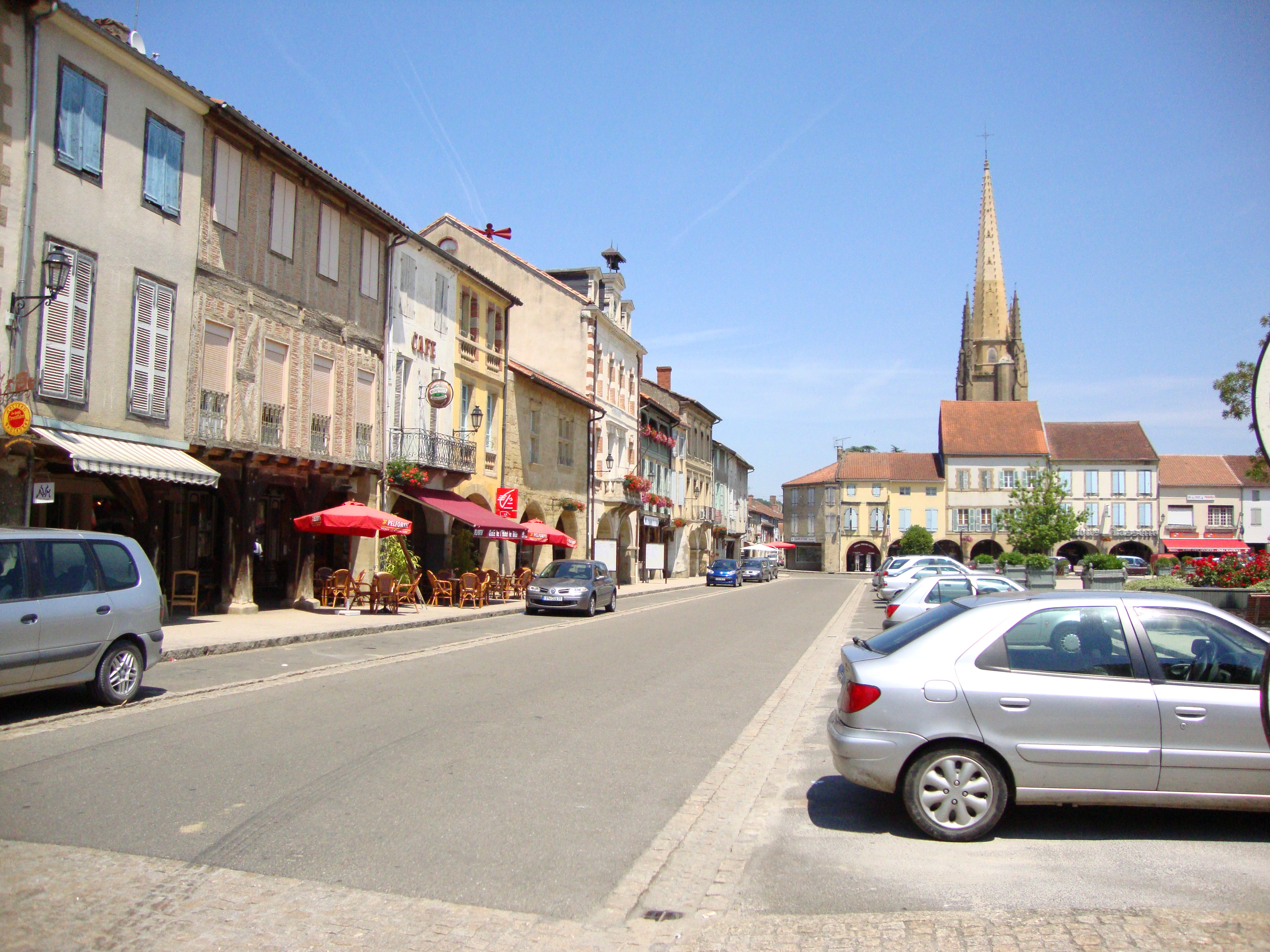 Marciac (Gers, Midi-Pyrénées, France) : la place centrale, cœur de la Bastide. À l'arrière-plan on aperçoit le clocher de l'église Notre-Dame.